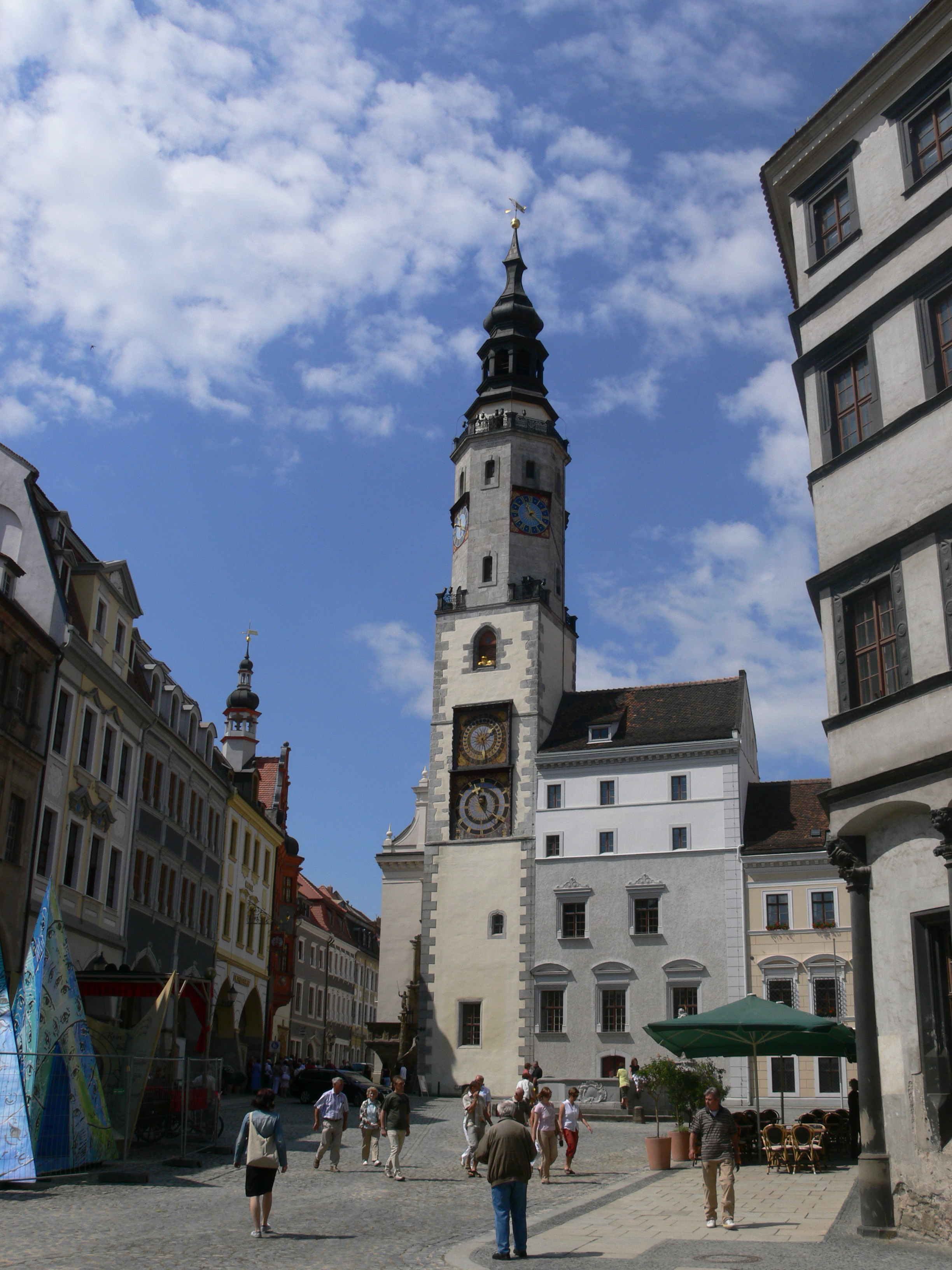 Rathaus Görlitz Altes Rathaus